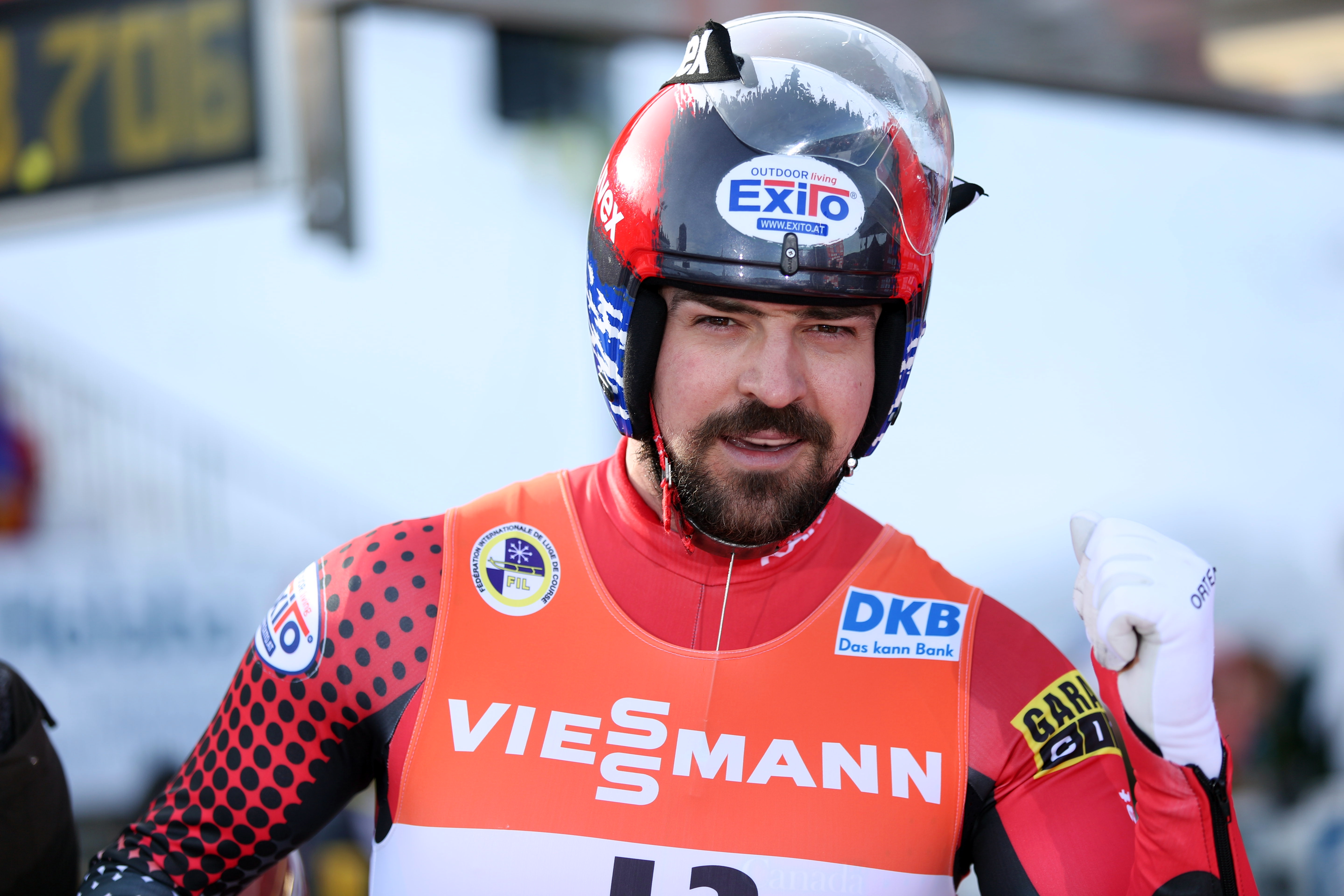 Samuel Edney beim Rennrodel-Weltcup der Herren in Oberhof 2017